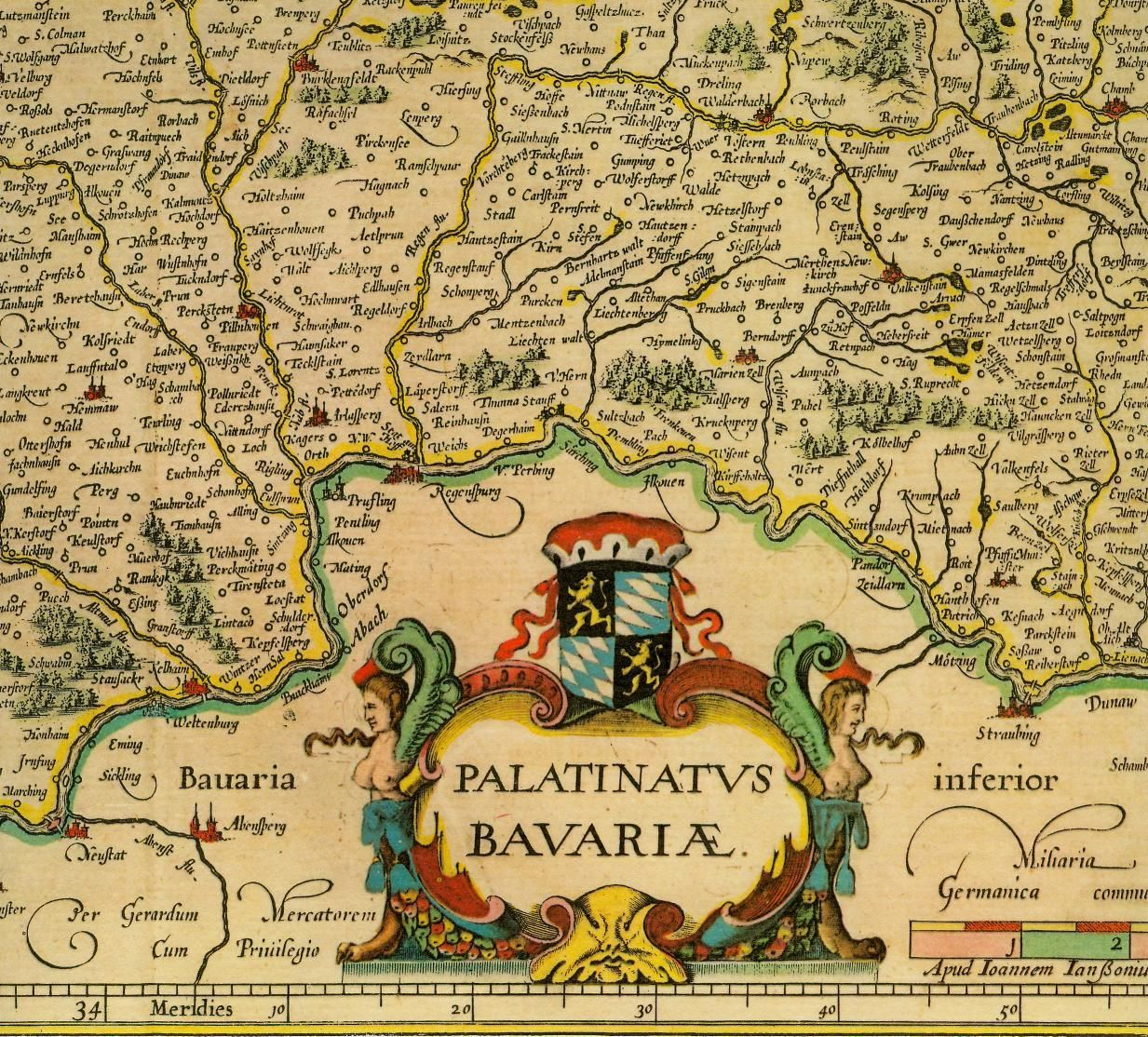 Landkarte Ober Bayern oder Ober Pfalz ca.1658 von Joannis Janßonius